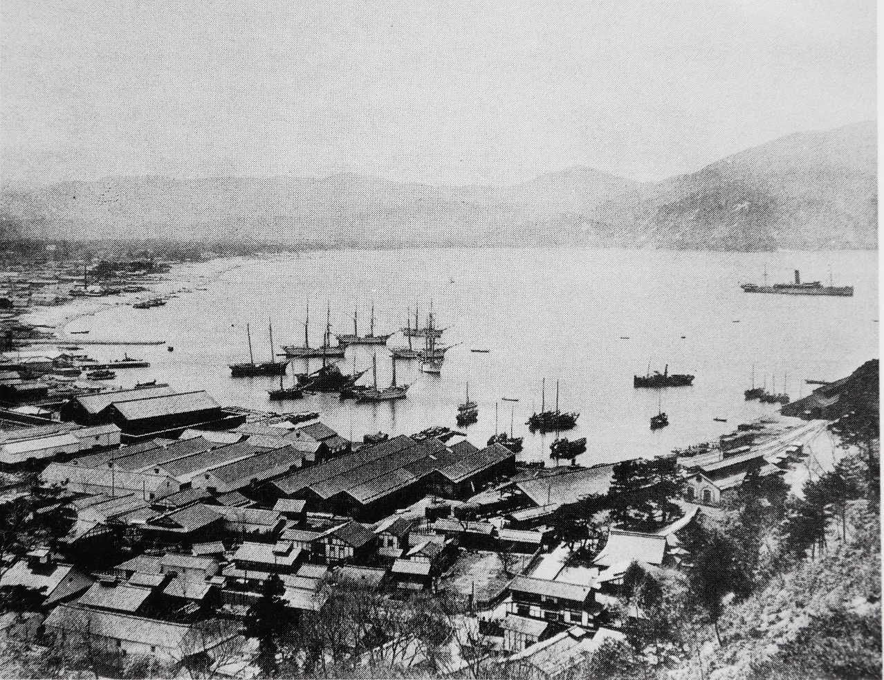 明治末期の敦賀港。福井県敦賀市。帆船が停泊し、海辺に倉庫が見える。